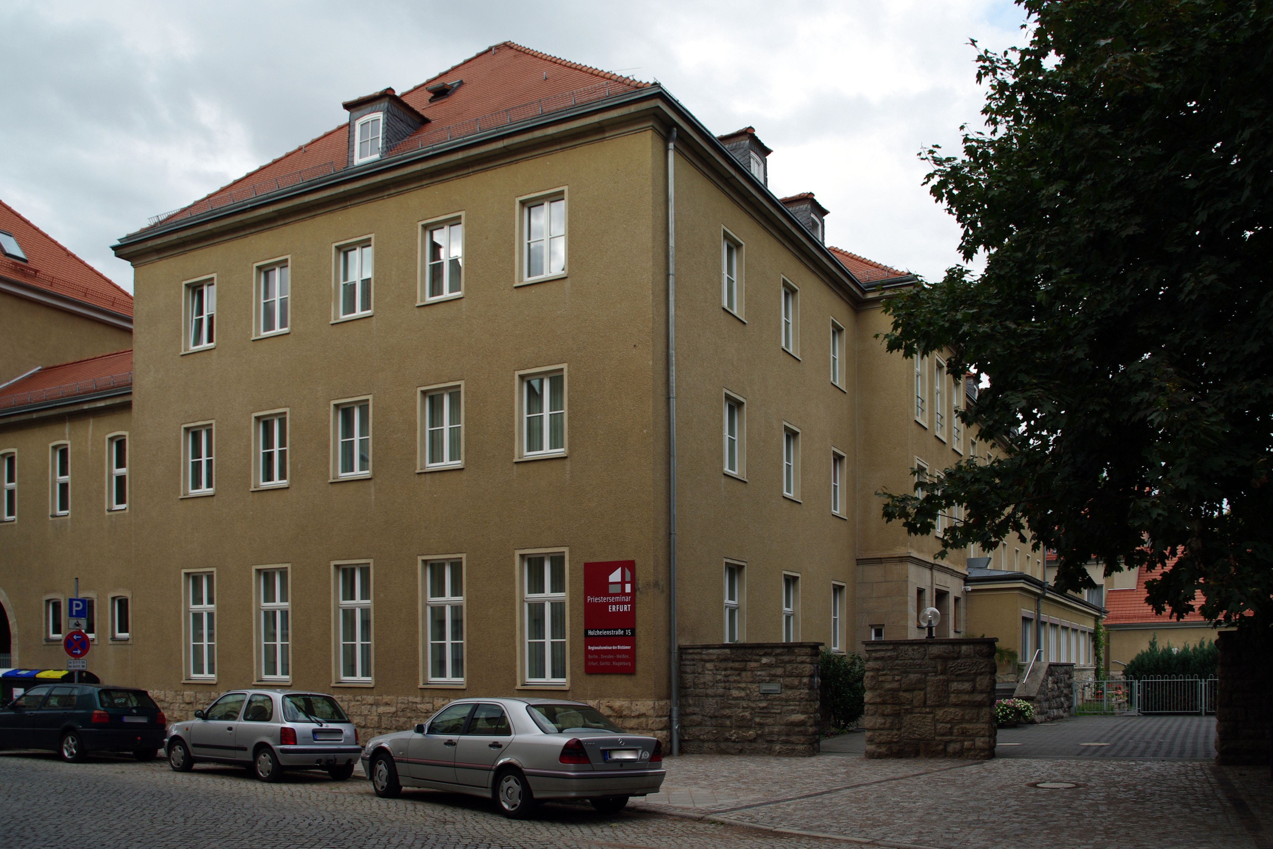 Das Priesterseminar in Erfurt.